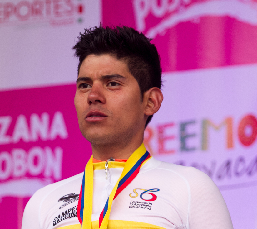 Elites Hombres Campeonatos Nacionales de Ruta Boyacá 2016